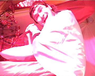 Caligola a film by Flavio Sciolè